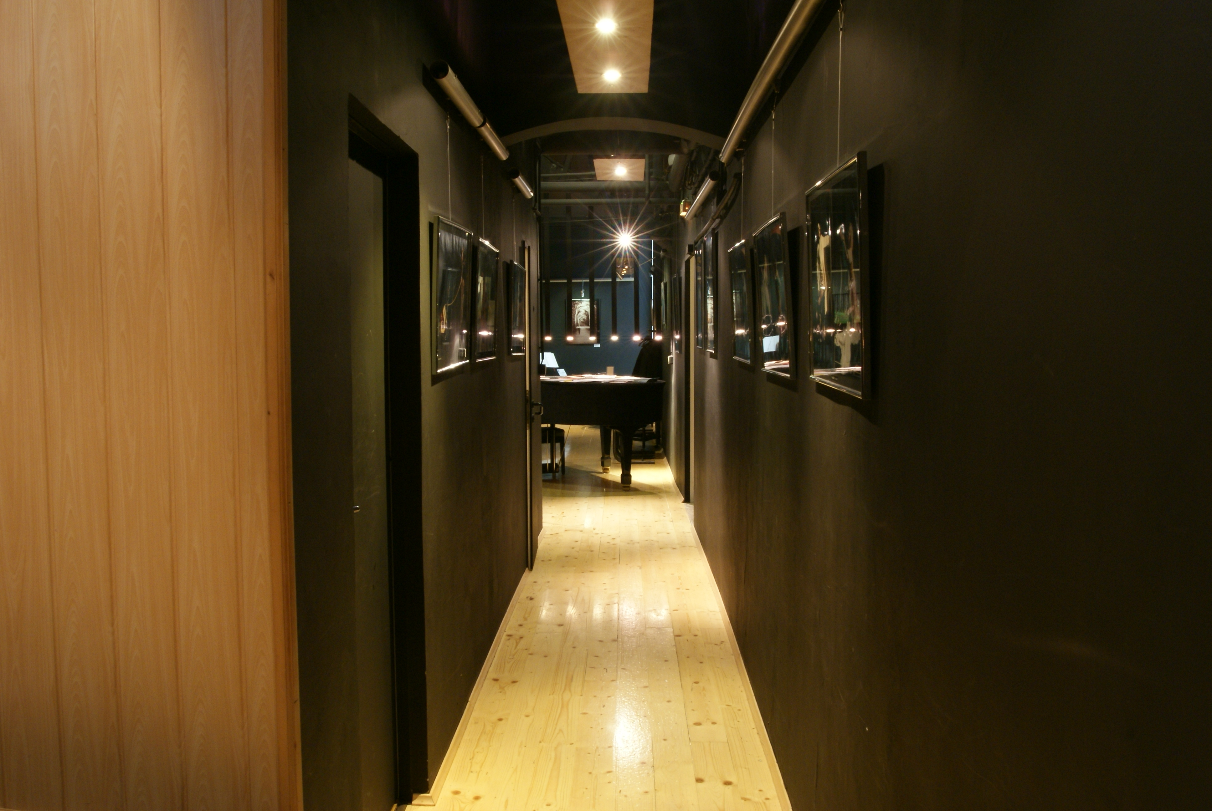 Couloir im Pygmalion Theater